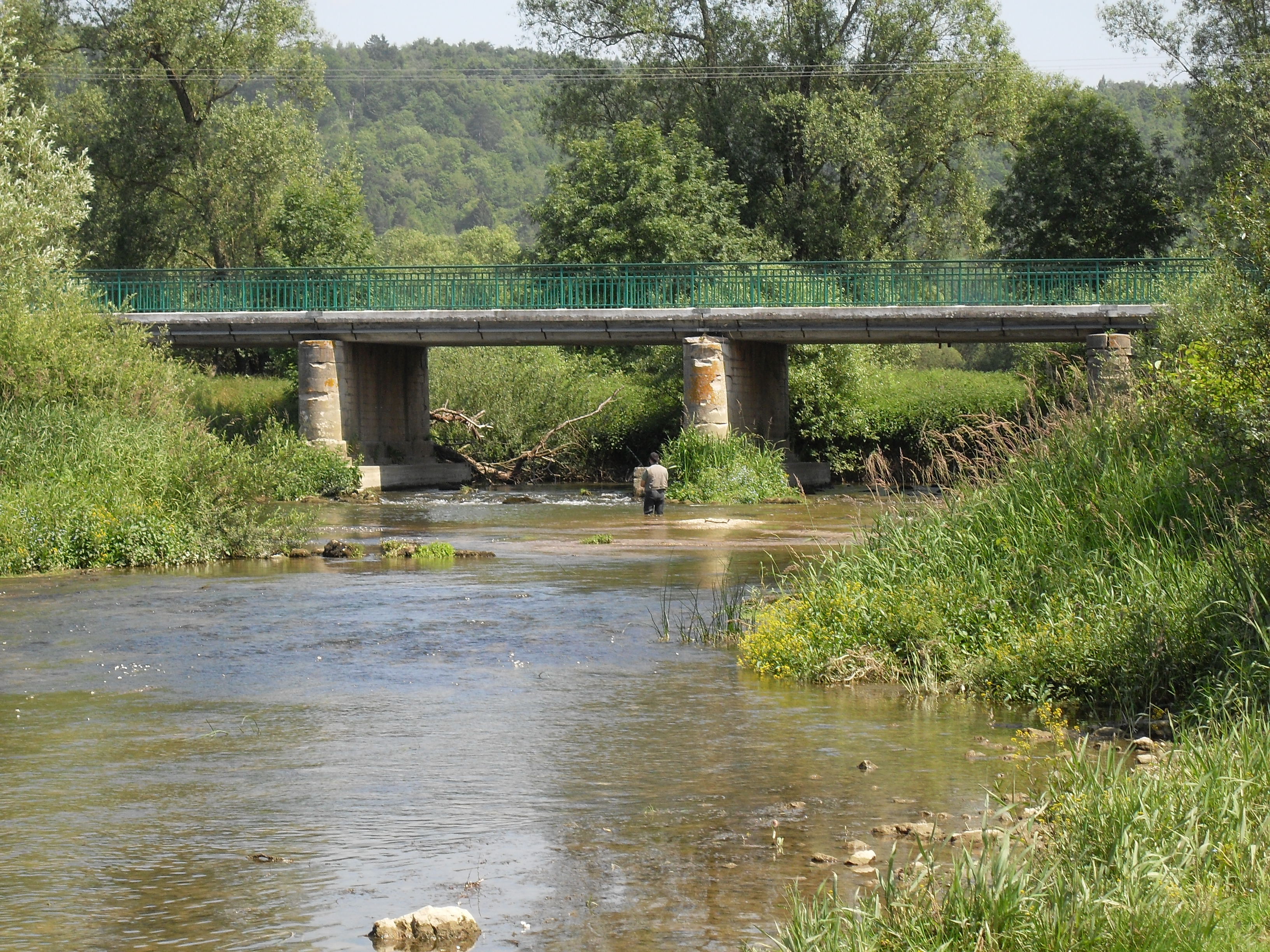 France, Ugny-sur-Meuse, Meuse (55) - le pont sur la Meuse.